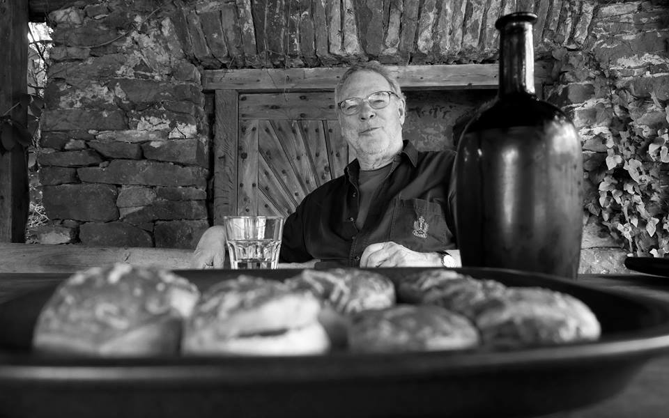 Szomjas György (Budapest, 1940. november 26. –) Kossuth- és Balázs Béla-díjas magyar filmrendező.